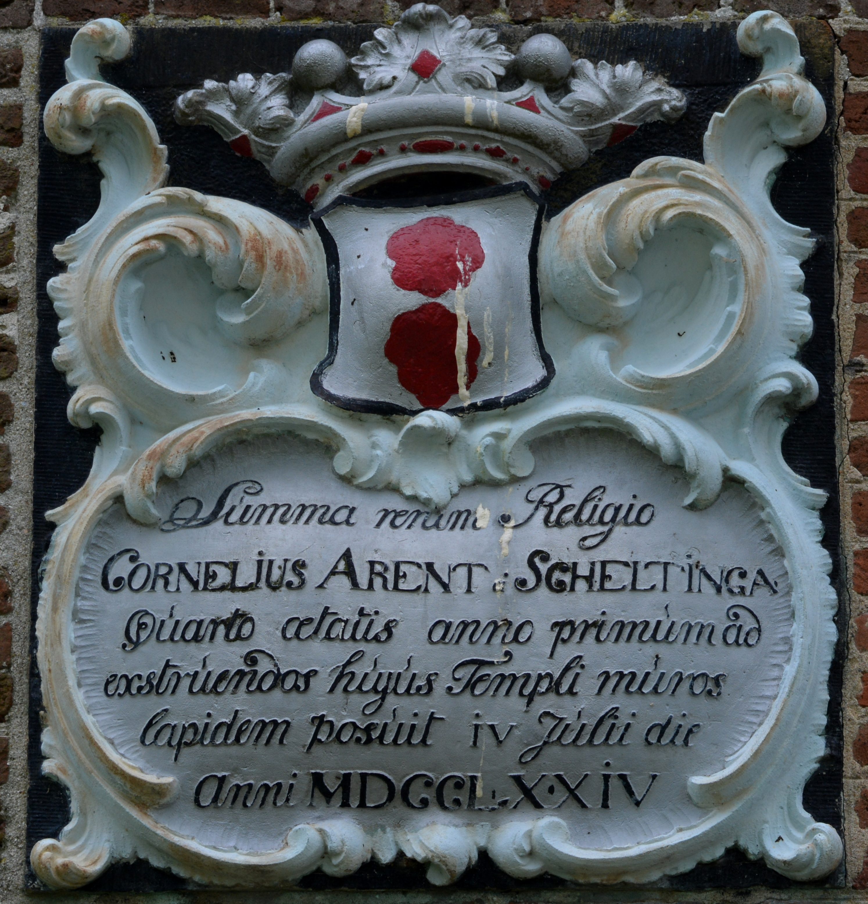 Gertrudistsjerke, Idaerd, gevelstien